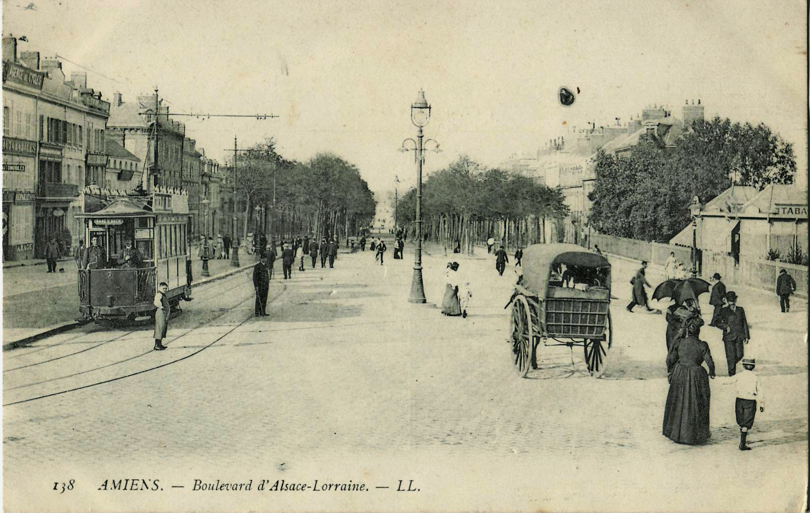 Carte postale ancienne éditée par LL, n°138 : AMIENS - Boulevard d'Alsace-Lorraine. Vue d'un tramway pour la gare Saint-Roch en stationnement à l'évitement de la gare du Nord